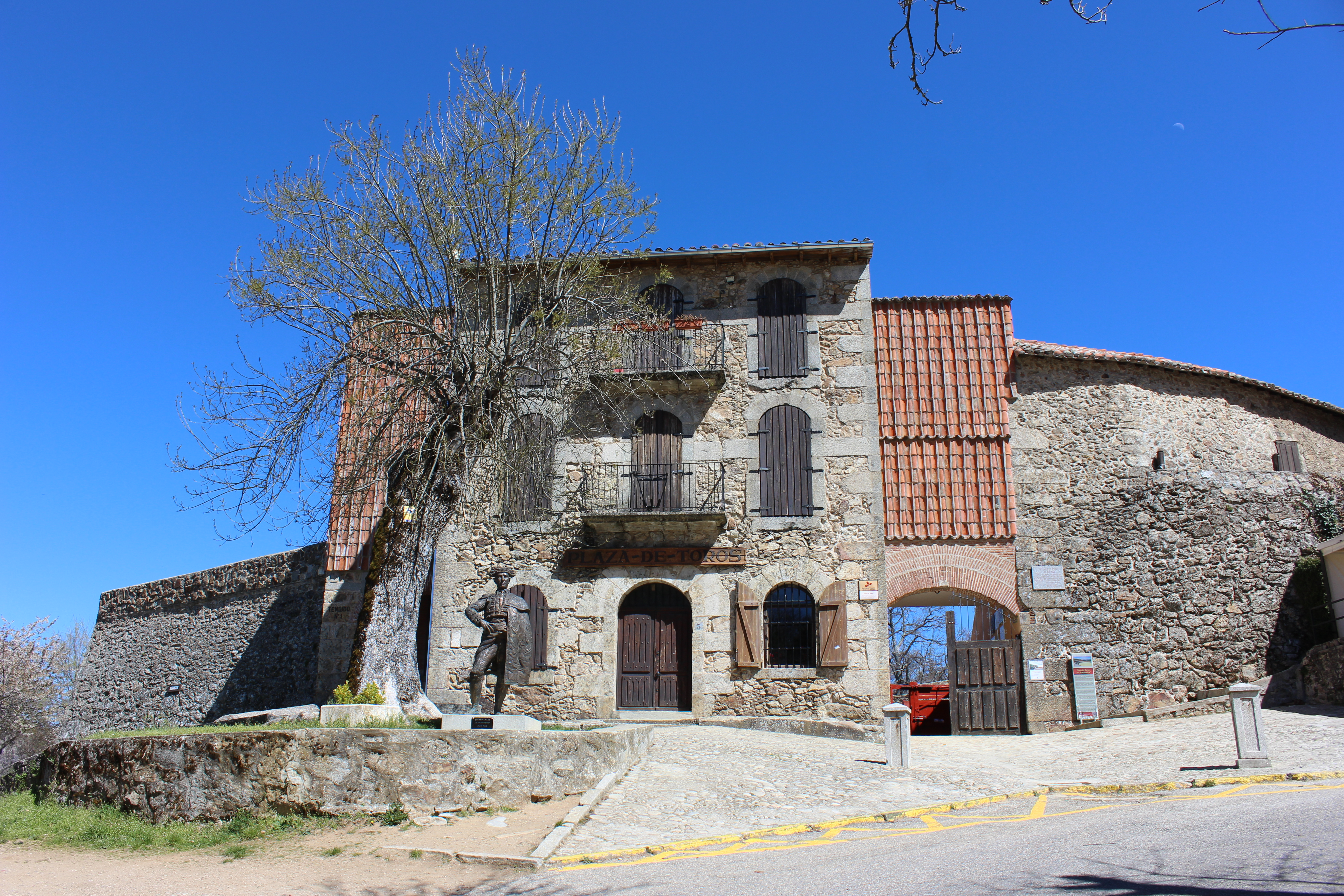 حلبة مصارعة الثيران في بيخار في إسبانيا.